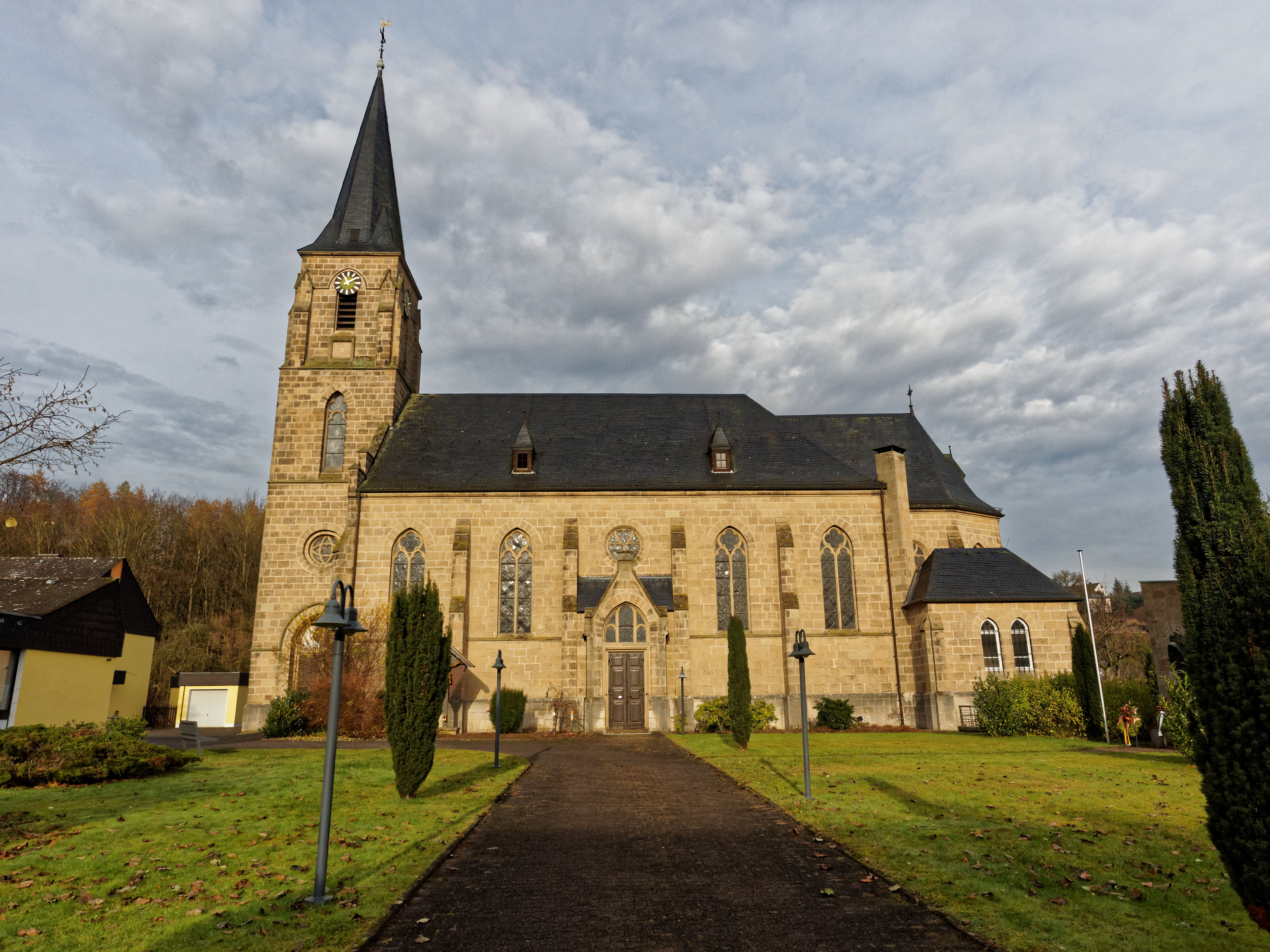 Südansicht der St. Vitus Kirche in Westheim bei Marsberg